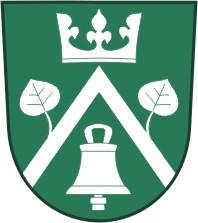 Mořinka znak